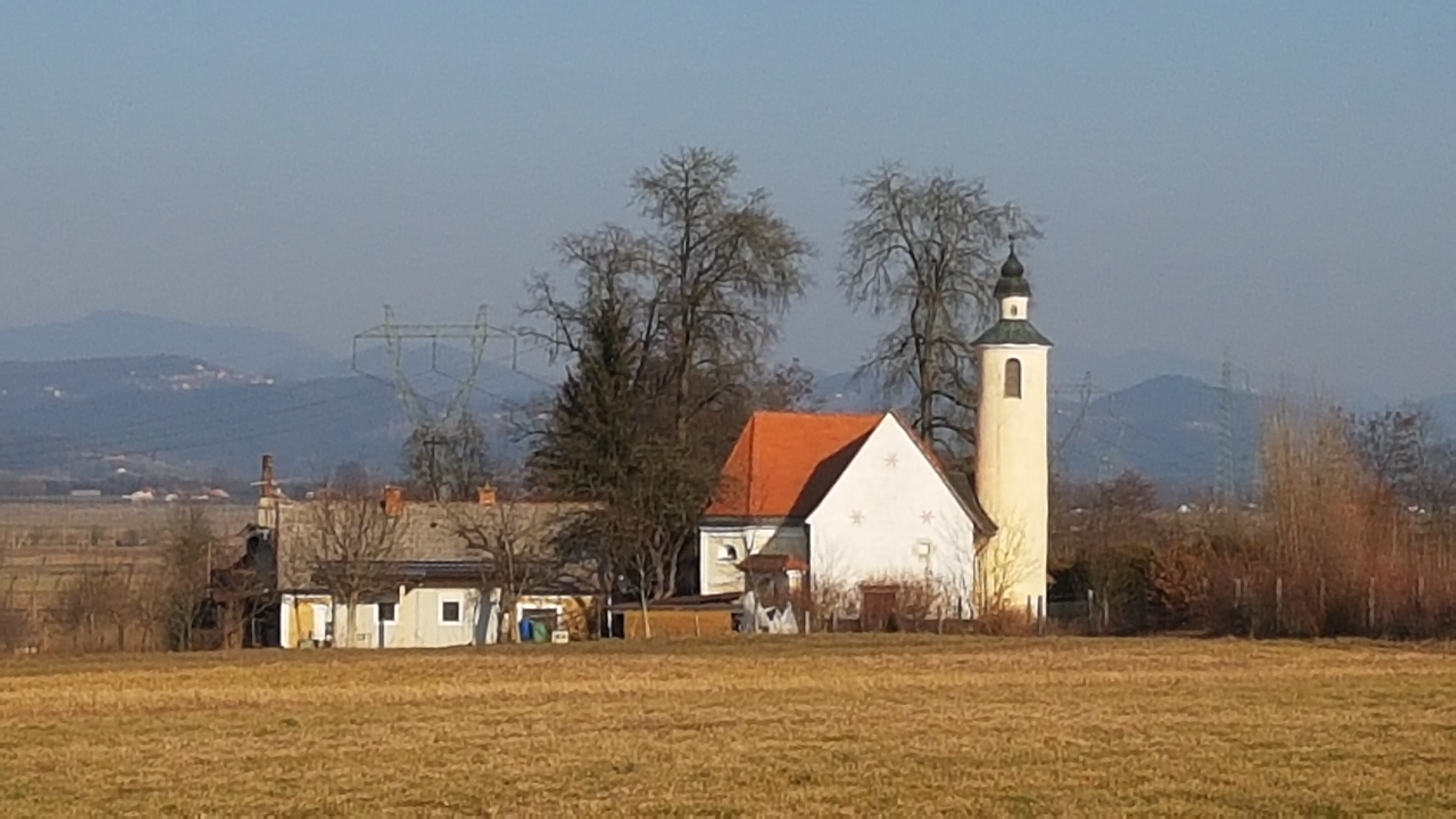 Podružnična cerkev sv. Matevža, Šmatevž, občina Braslovče